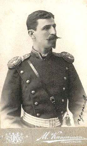 Български Иван Цончев (1858-1910), Генерал и революционер, войвода на Върховния македонски комитет, основен организатор на Горноджумайското и участник в Илинденското въстание Deutsch Iwan Zontschew (1858-1910), bulgarischer Militär, General und Freiheitskämpfer